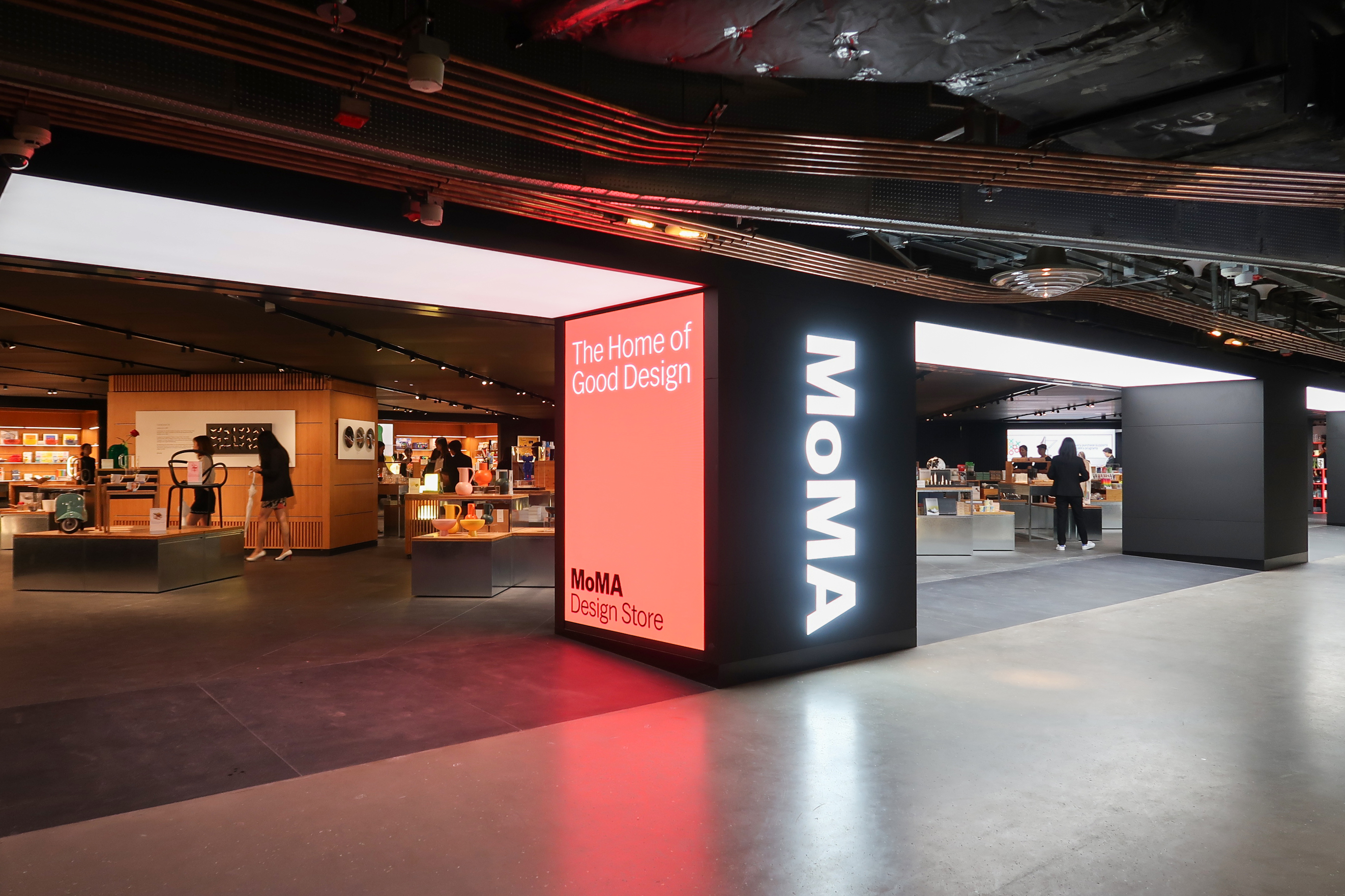 K11 MUSEA Level 7 Bohemian Garden